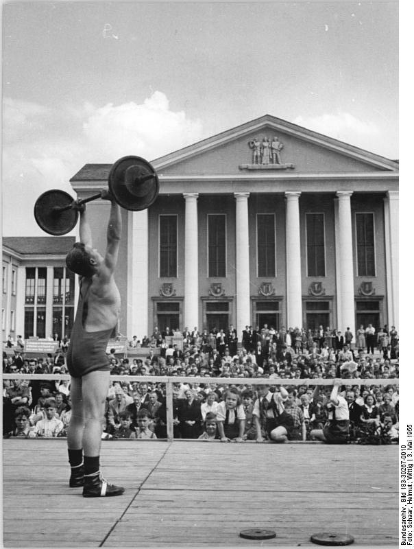 Unterwellenborn, 1. Mai, Gewichtheber Zentralbild Schaar Wittig 13 Motive 03.05.1955 -2952- Wie die Kumpel der Maxhütte in Unterwellenborn den 1. Mai 1955 begingen. 1.Mai - Feier Kultur und Sportveranstaltungen vor dem neuen Kulturhaus der Maxhütte. -Die Gewichtheber bei ihren Vorführungen.